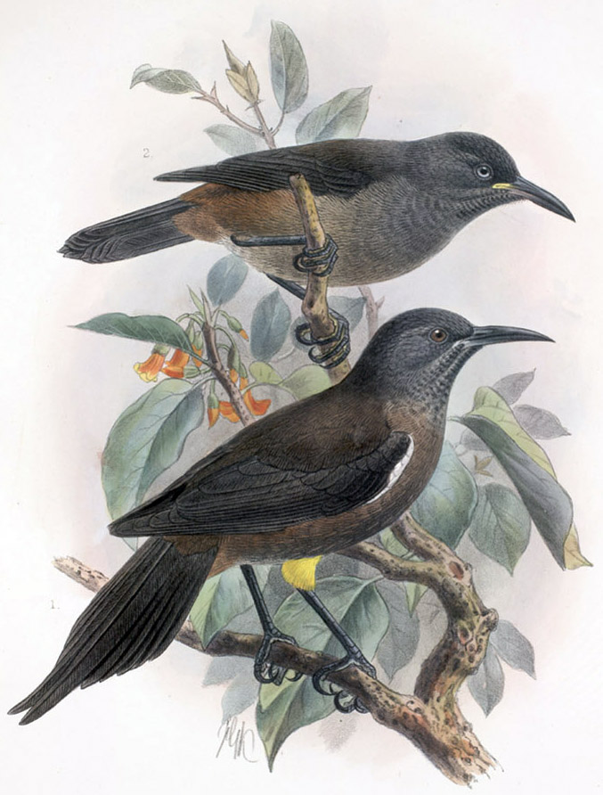 Adult and juvenile Moho braccatus